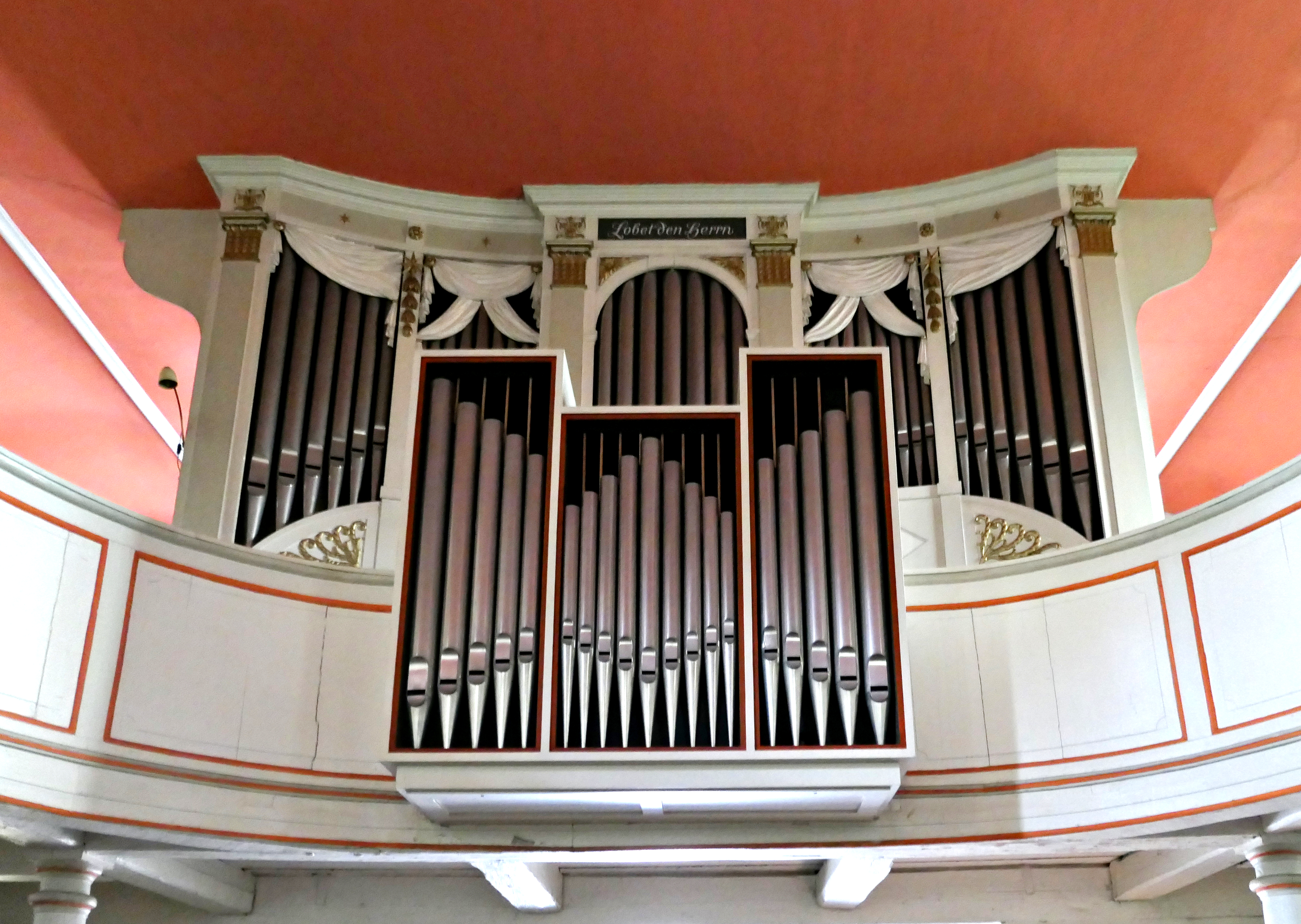 Hitzacker St. Johannis, Landkreis Lüchow-Dannenberg, Niedersachsen, Deutschland